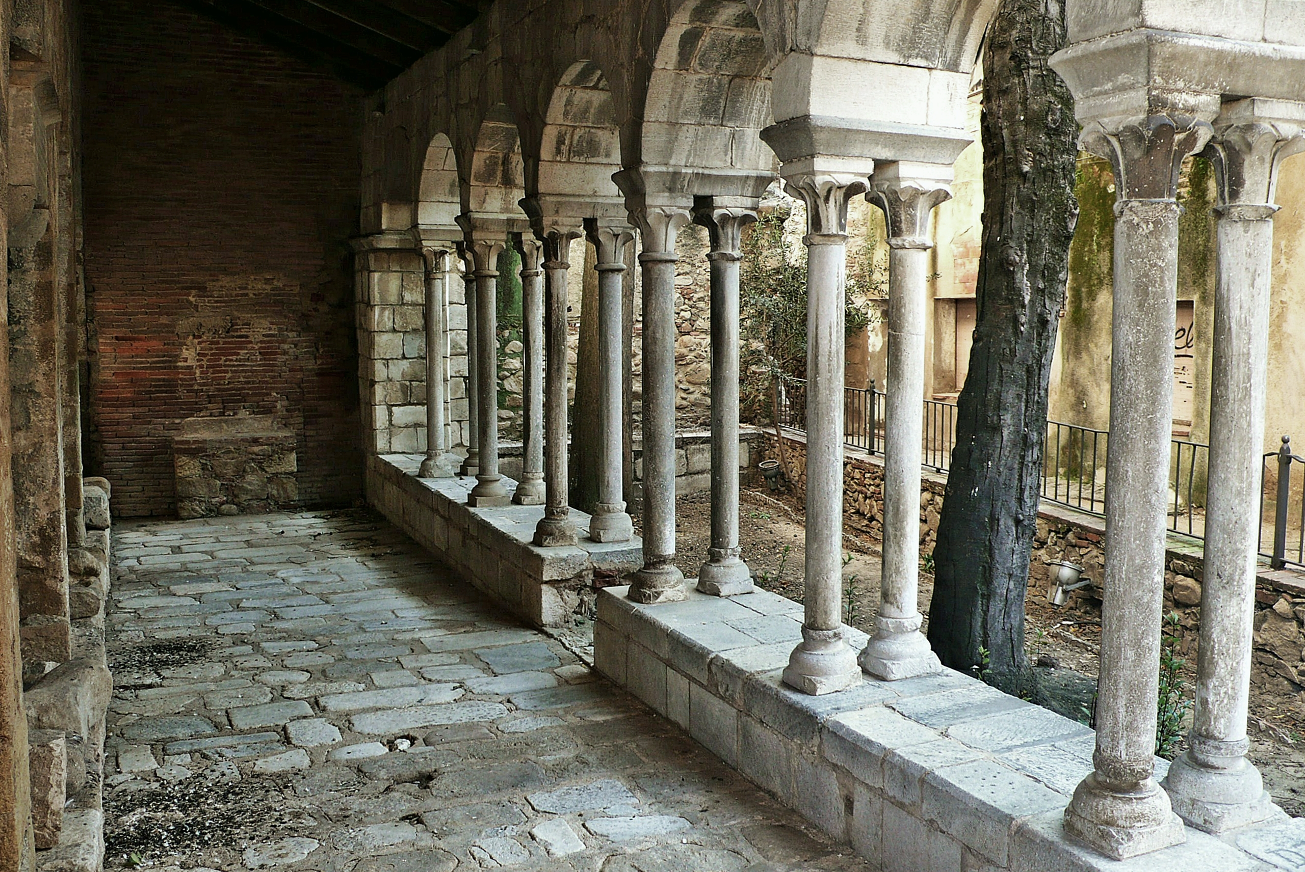 breda-2012